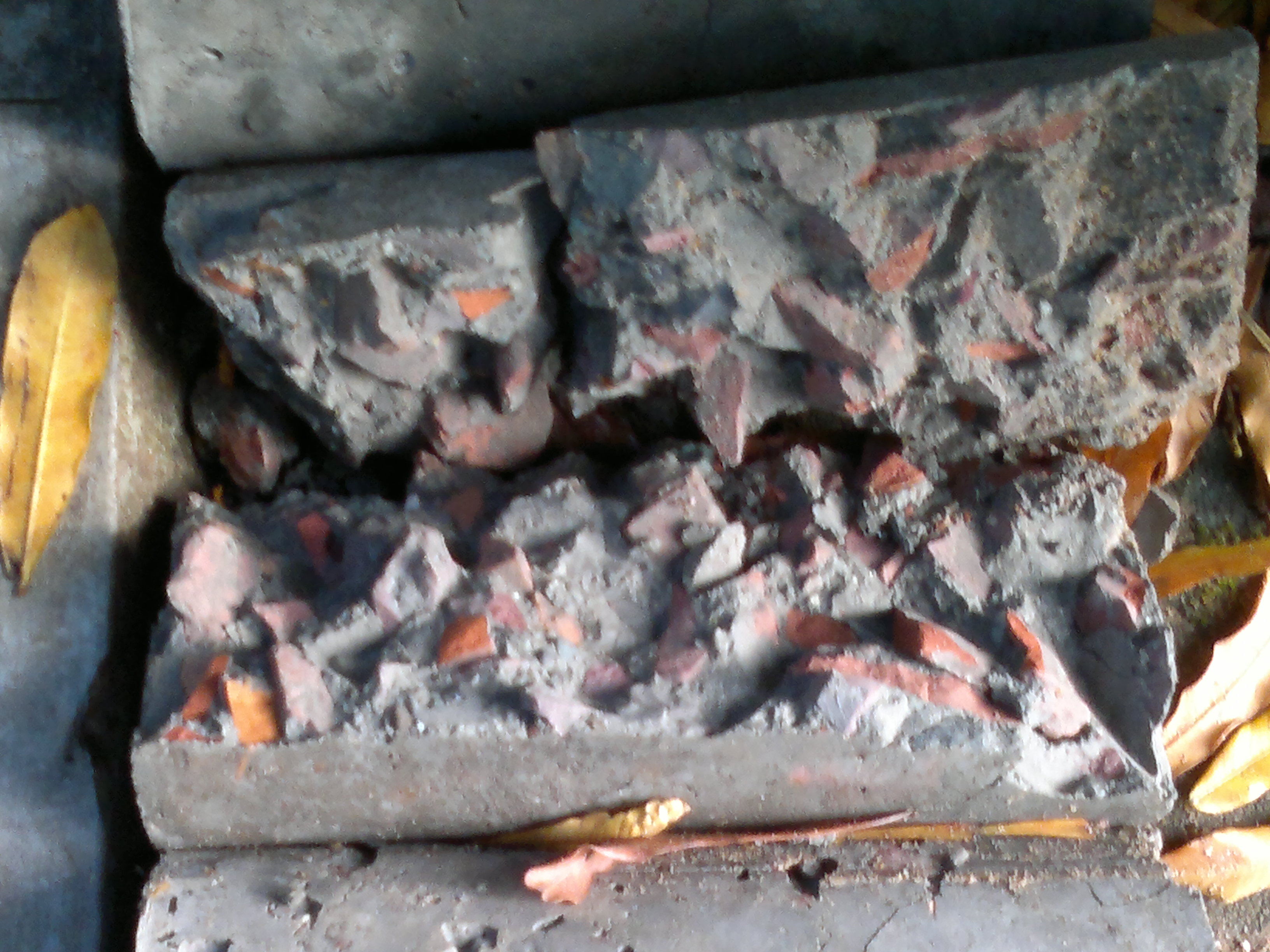 Sebagai agregat kasar beton